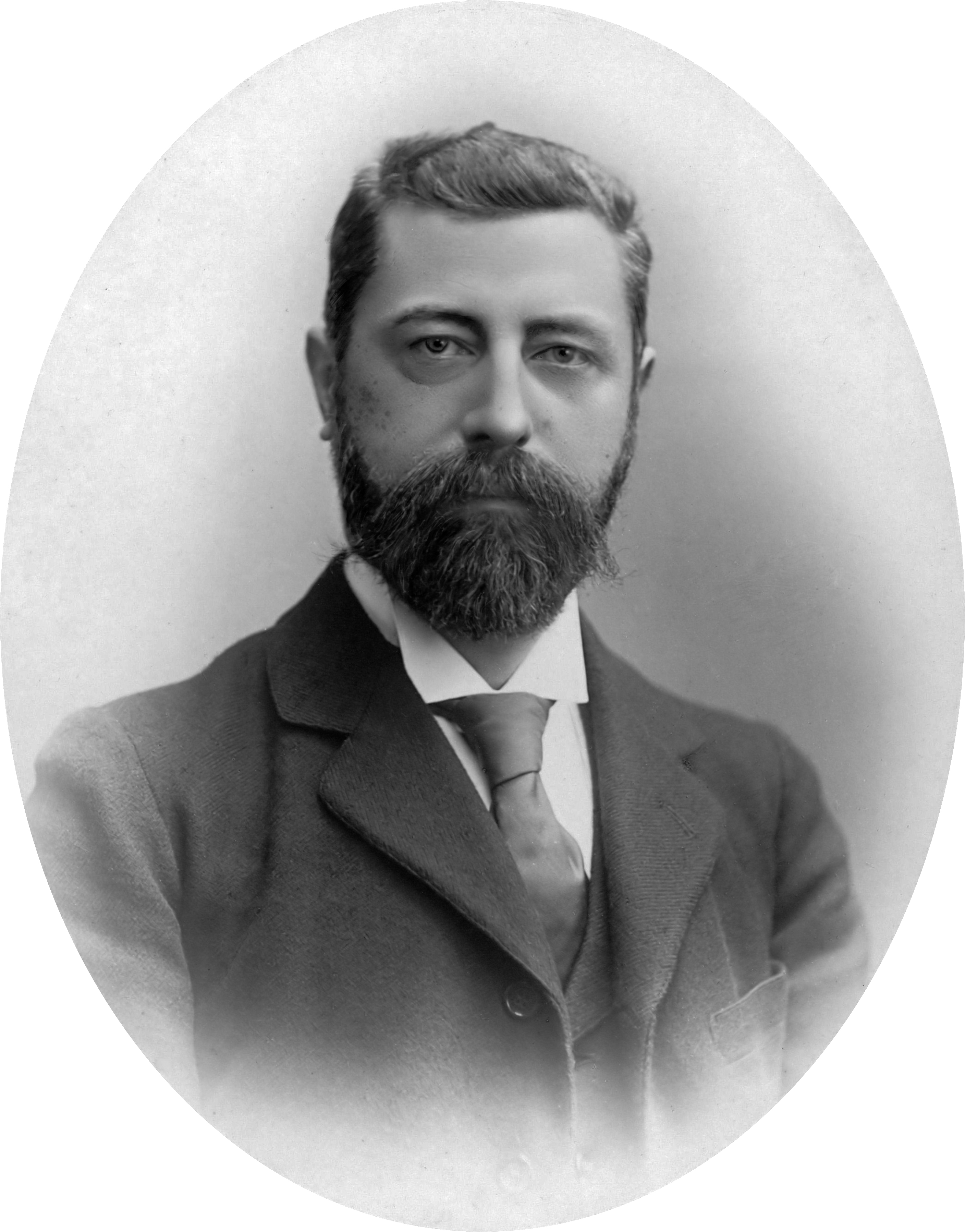 Portret van Hendrik Cornelis van den Honert (1854-1916), administrateur (1875-1898) en directeur (1898-1916) van de Deli-Maatschappij. Opschrift op achterzijde: H.C. Honert (1883-1892) 1892